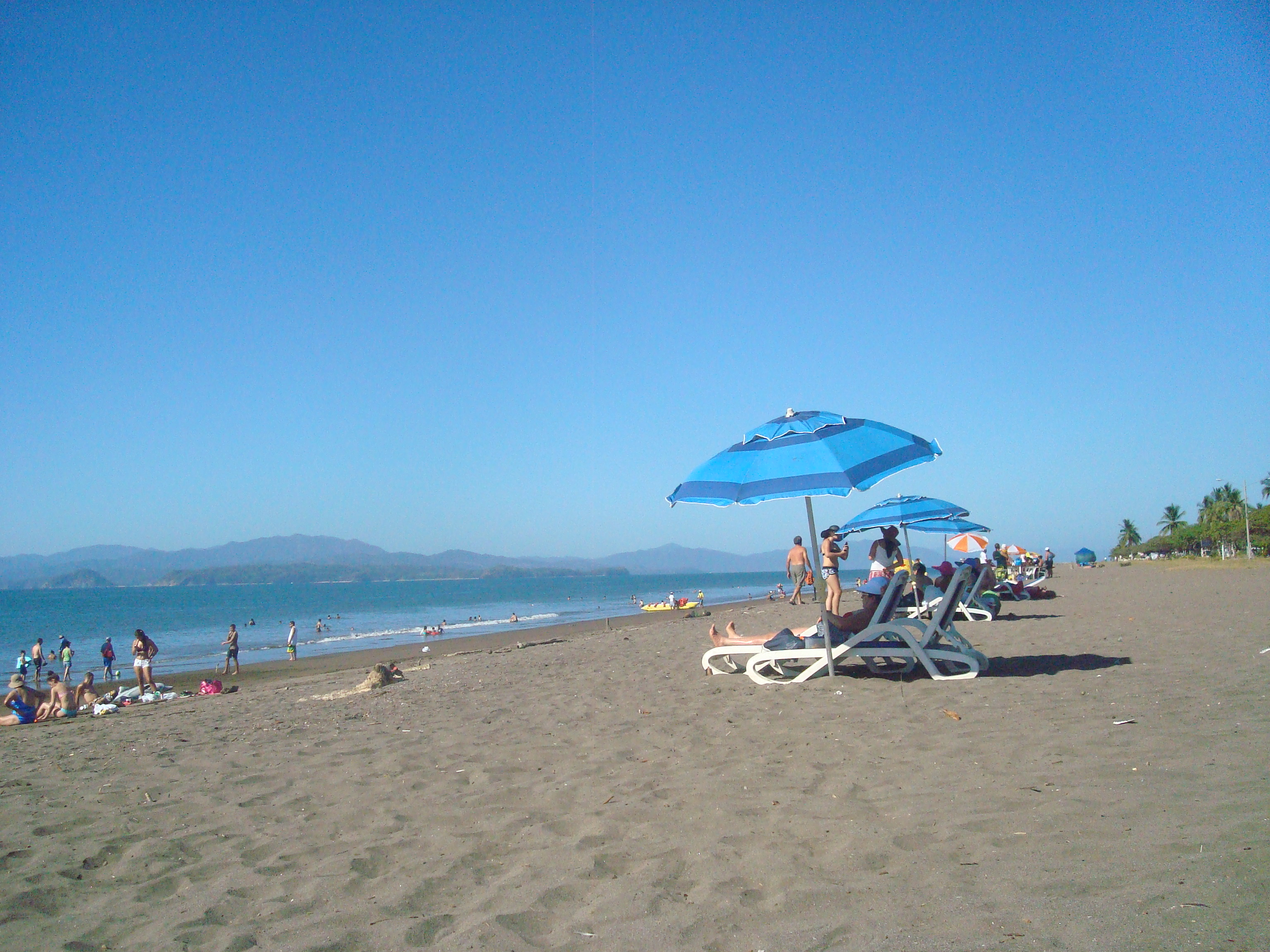 Vista de la playa de Puntarenas, Costa Rica. 2014.